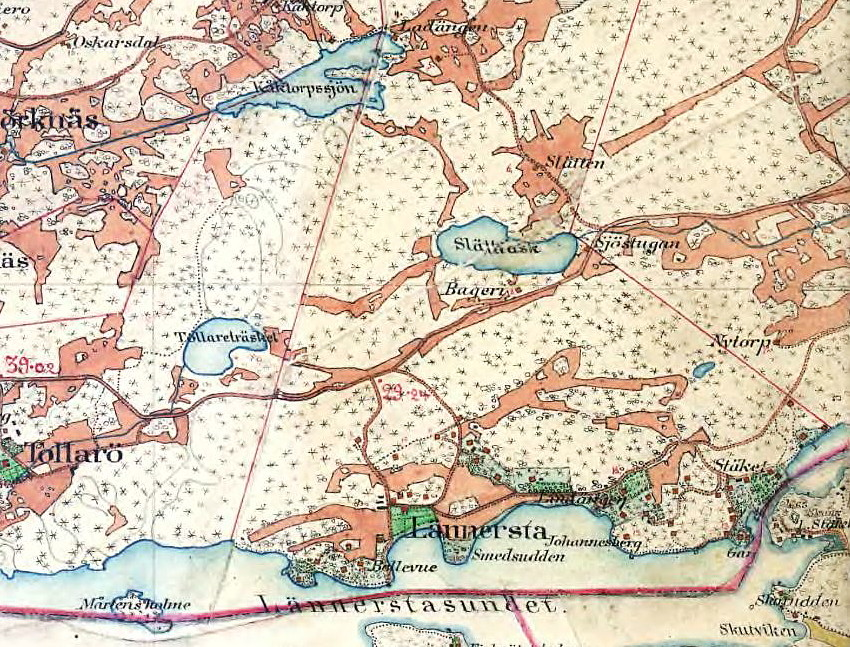 Lännersta gård på Häradsekonomiska kartan